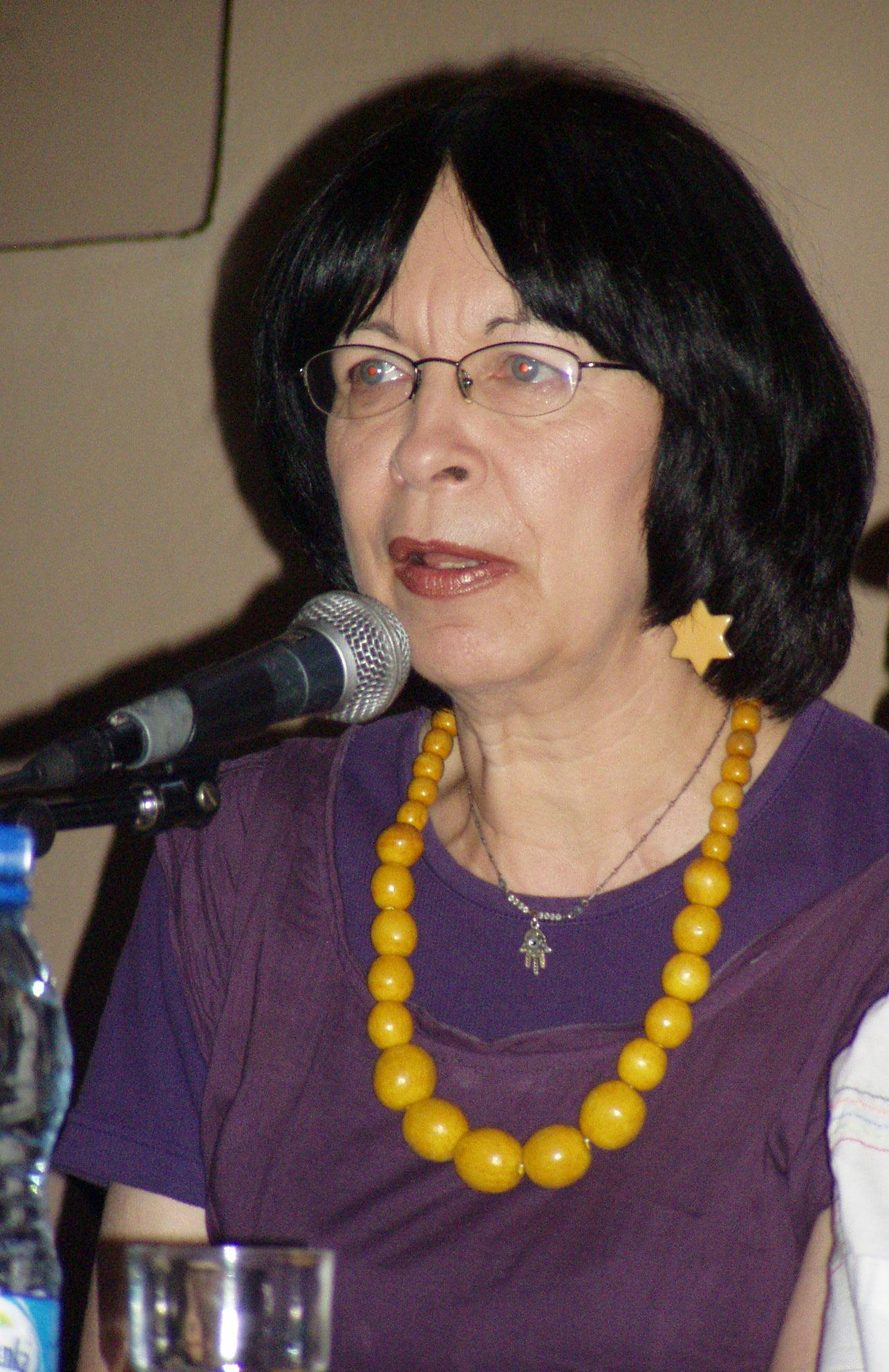 Monika Krajewska na wyskładzie w synagodze Kupa podczas Festiwalu Kultury Żydowskiej w Krakowie